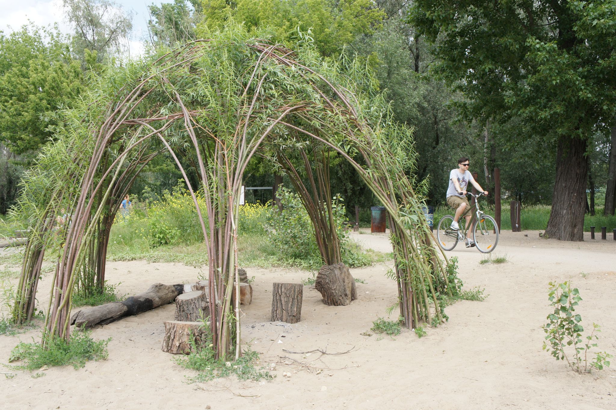 Nadwiślańska plaża na wysokości ulicy Krynicznej na Saskiej Kępie w Warszawie. Widoczna żywa kopuła wierzbowa.